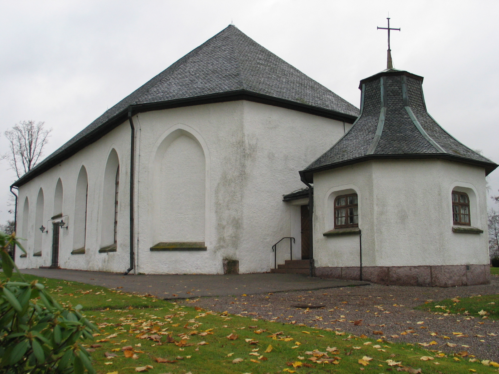 Brålanda kyrka, Dalsland